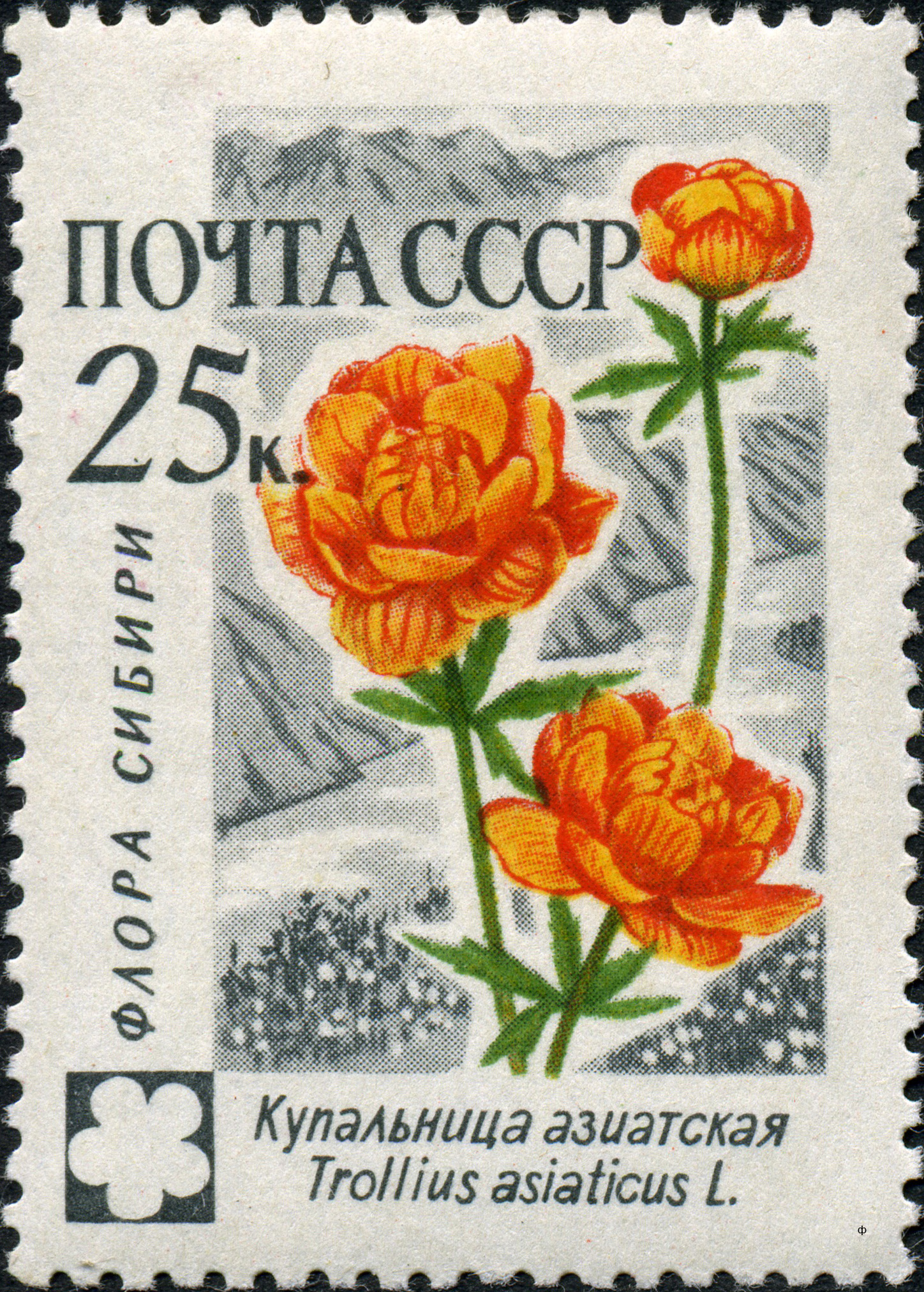 Марка СССР